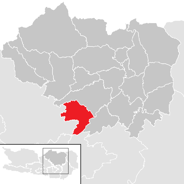 Bezirk Sankt Veit an der Glan